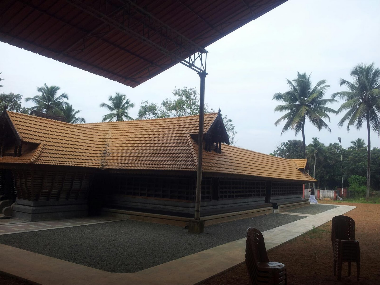 ഇത് ദക്ഷിണകേരളത്തിലെ പ്രധാനപ്പെട്ട ശിവപാർവ്വതിക്ഷേത്രം